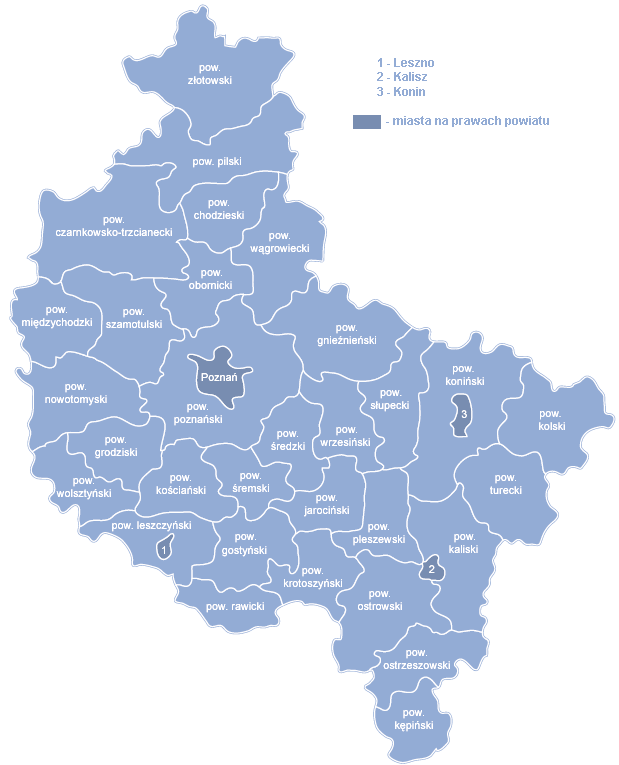 Podział administracyjny województwa wielkopolskiego na powiaty i miasta na prawach powiatu